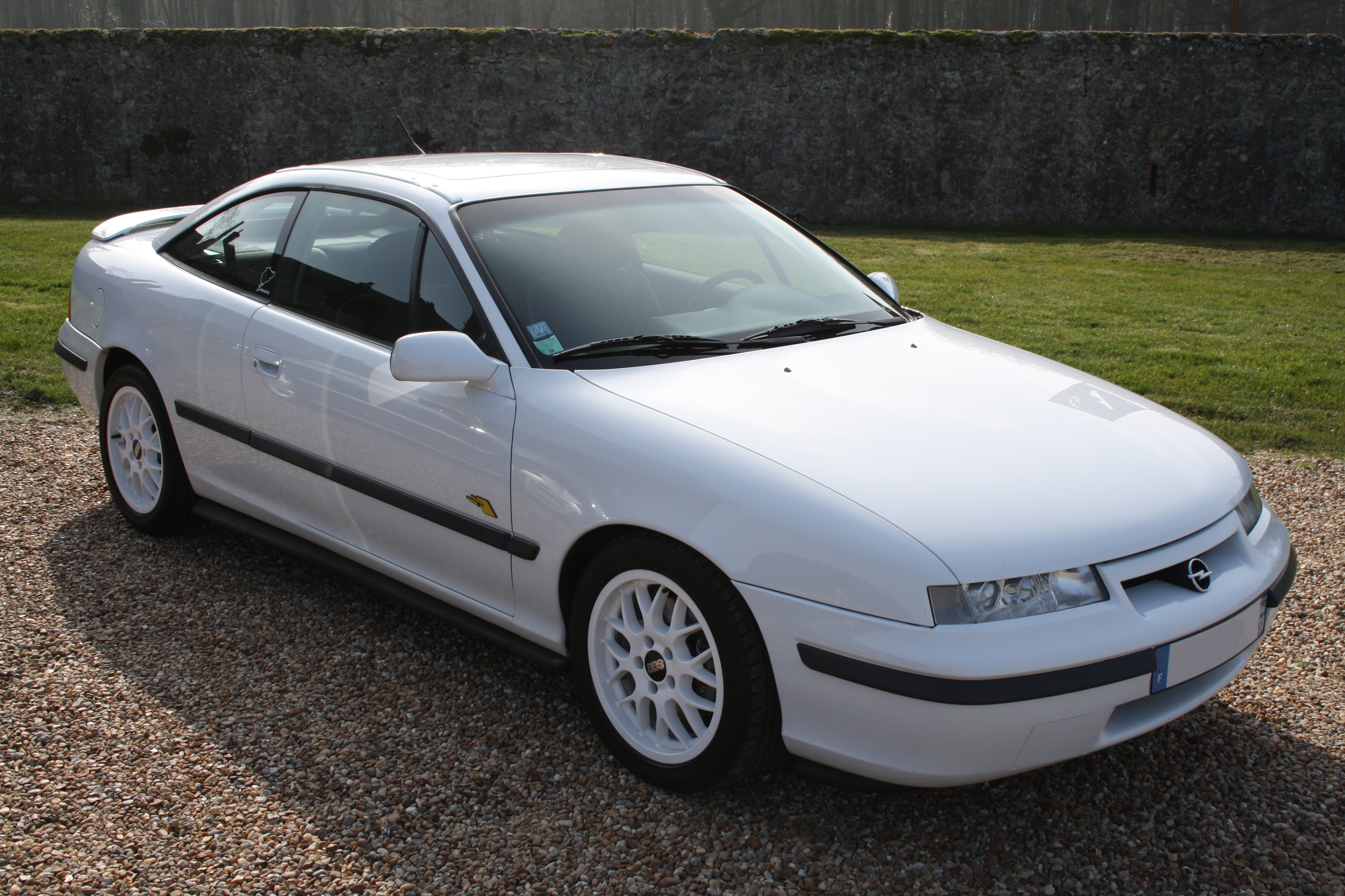 Opel Calibra V6 Kéké Rosberg Edition 1996